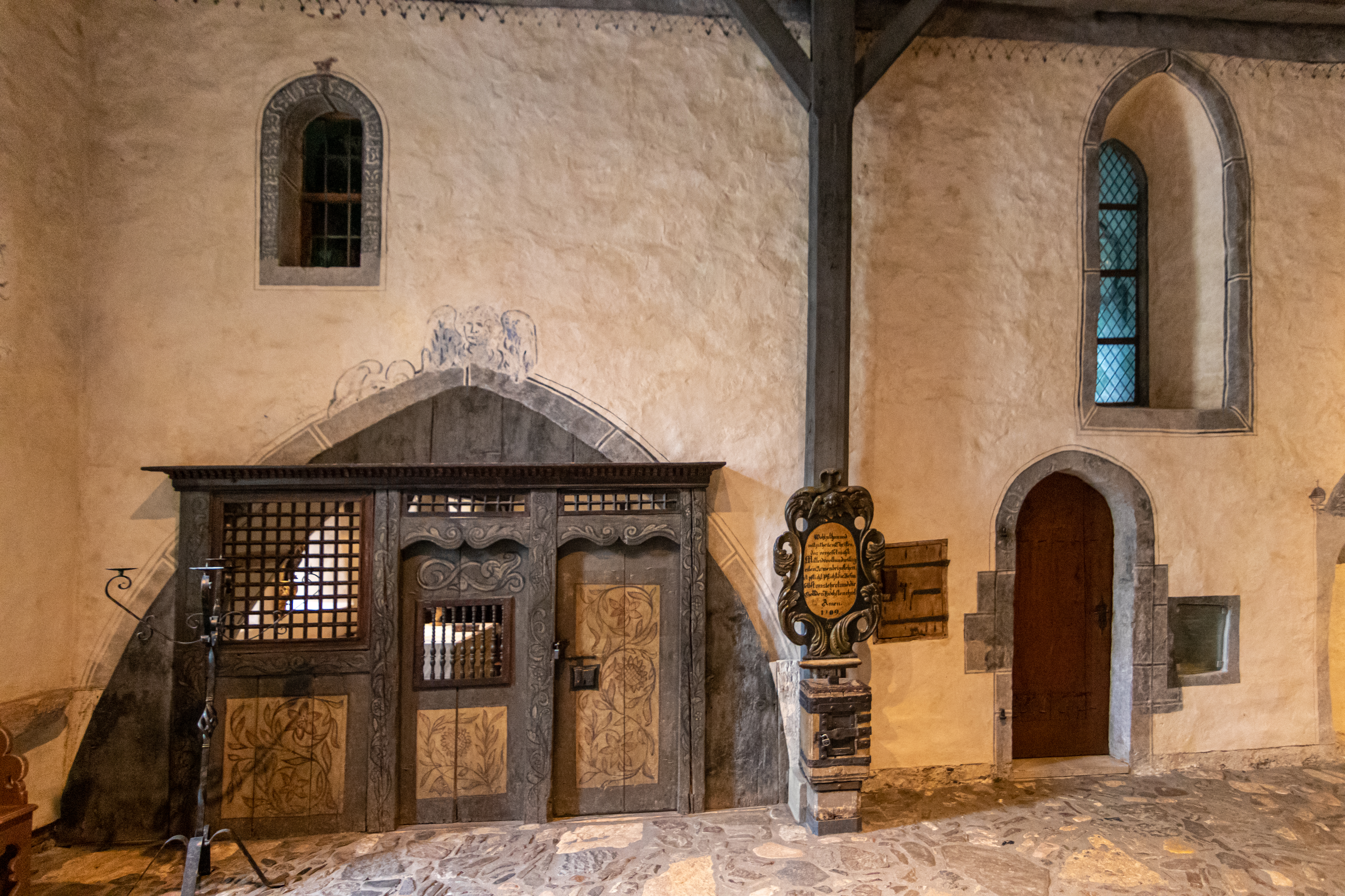 Hospital Great Holy Cross